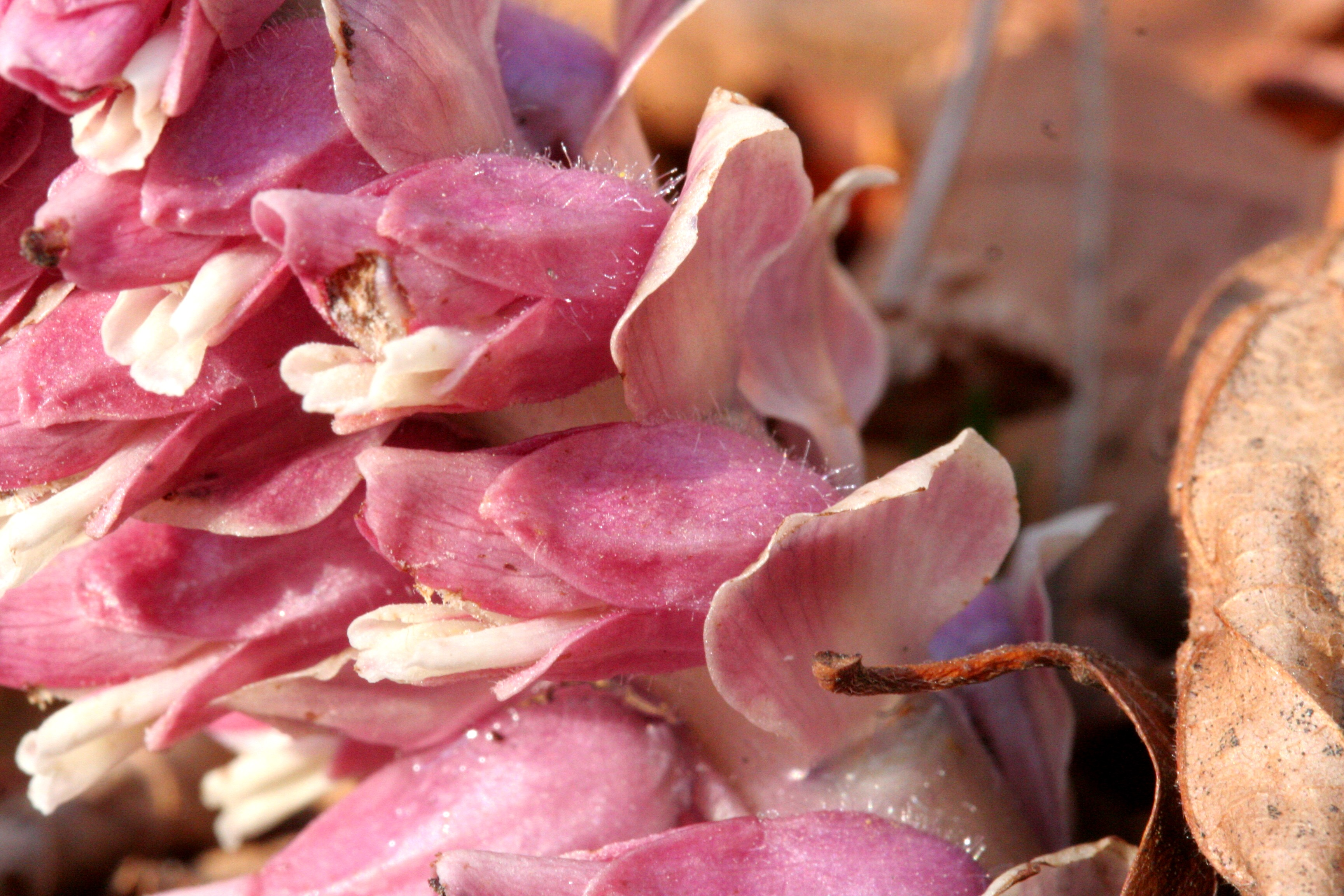 Lathraea squamaria Località: Villa Prima, Limana (BL), 350 m s.l.m. - 3/4/2008